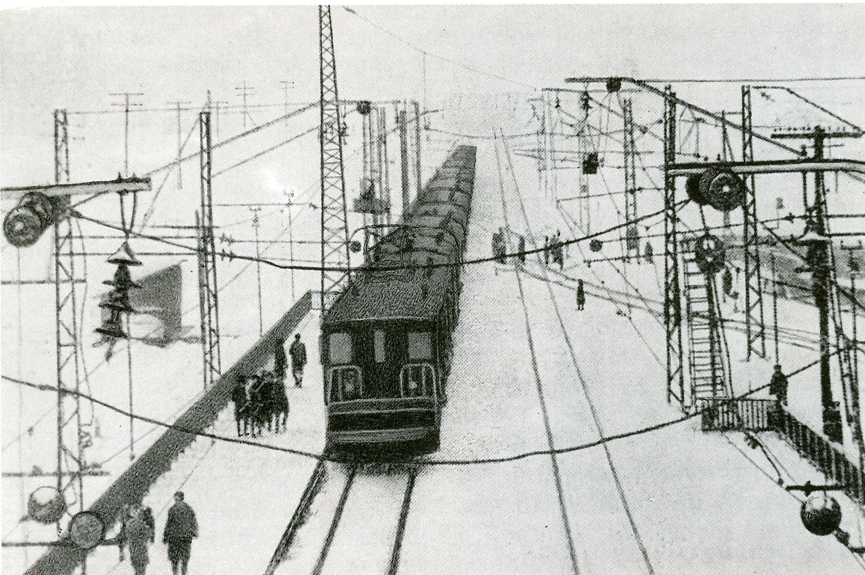 Станция Мурманск 1939